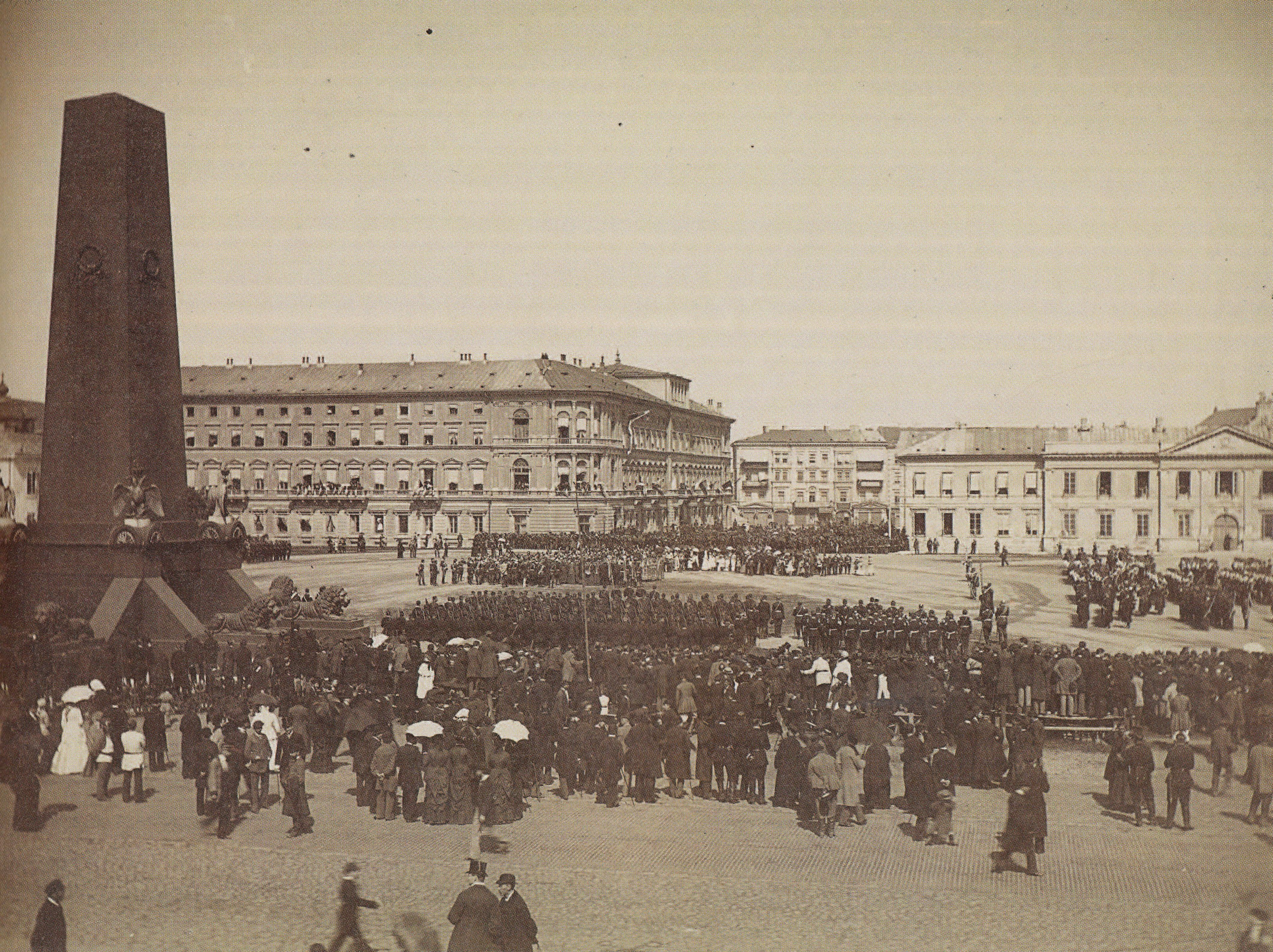 Warszawska uroczystość na placu Saskim z okazji koronacji cara Aleksandra III na Kremlu 15 maja / 27 maja 1883 r.